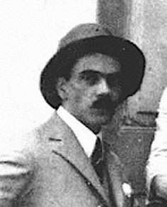 José Rodrigues Leite e Oiticica (1882 - filólogo brasileiro. Um dos grandes nomes por trás da Insurreição anarquista de 1918 no Rio de Janeiro, membro da Fraternitas Rosicruciana Antiqua.